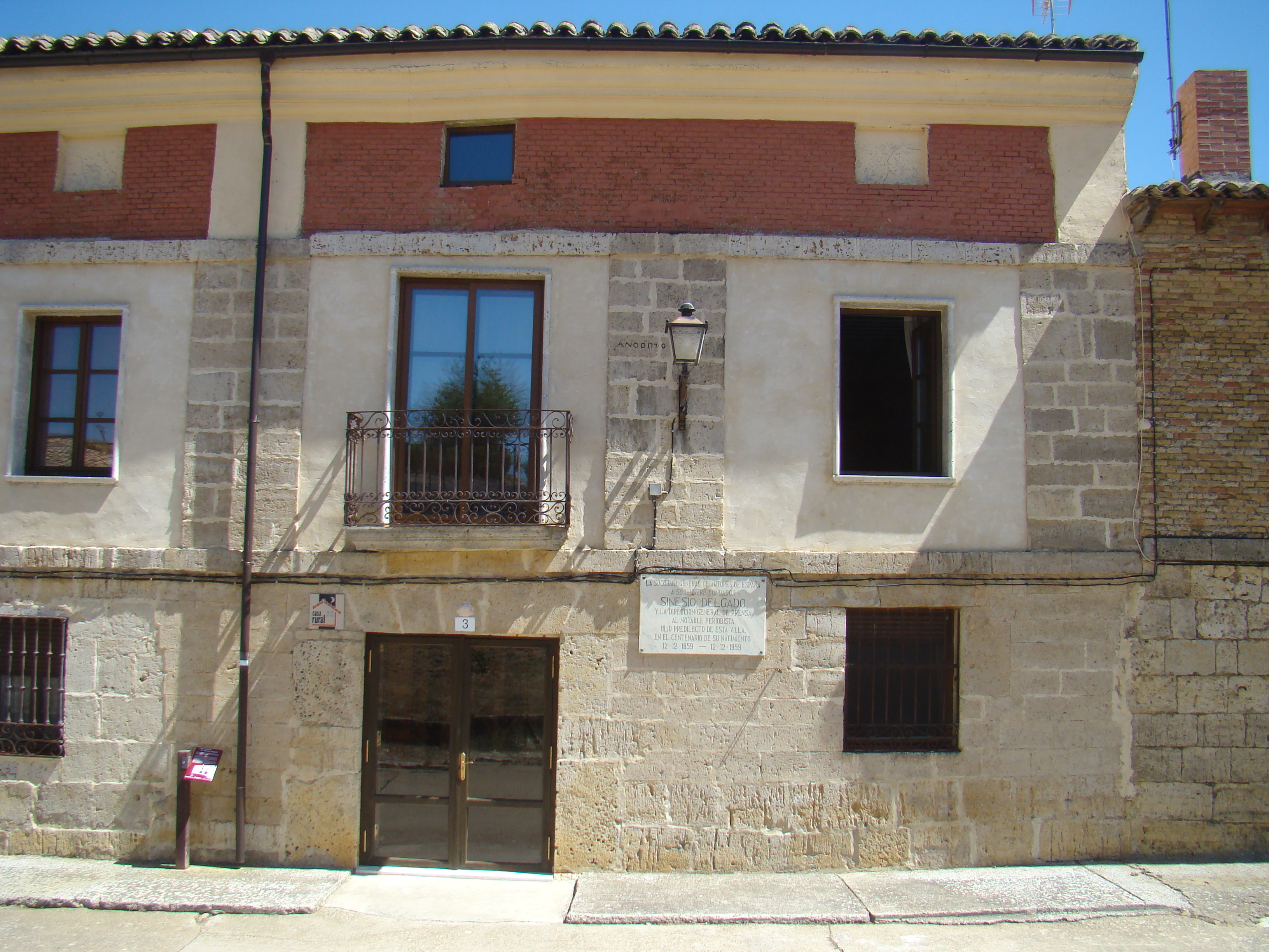 Támara de Campos en la provincia de Palencia. Casa de Sinesio Delgado, fundador de la SGAE y escritor (1859-1928). En la fachada puede verse una placa-homenaje para este personaje. La casa es de piedra, de arquitectura popular. Pertenece a la familia Chico.